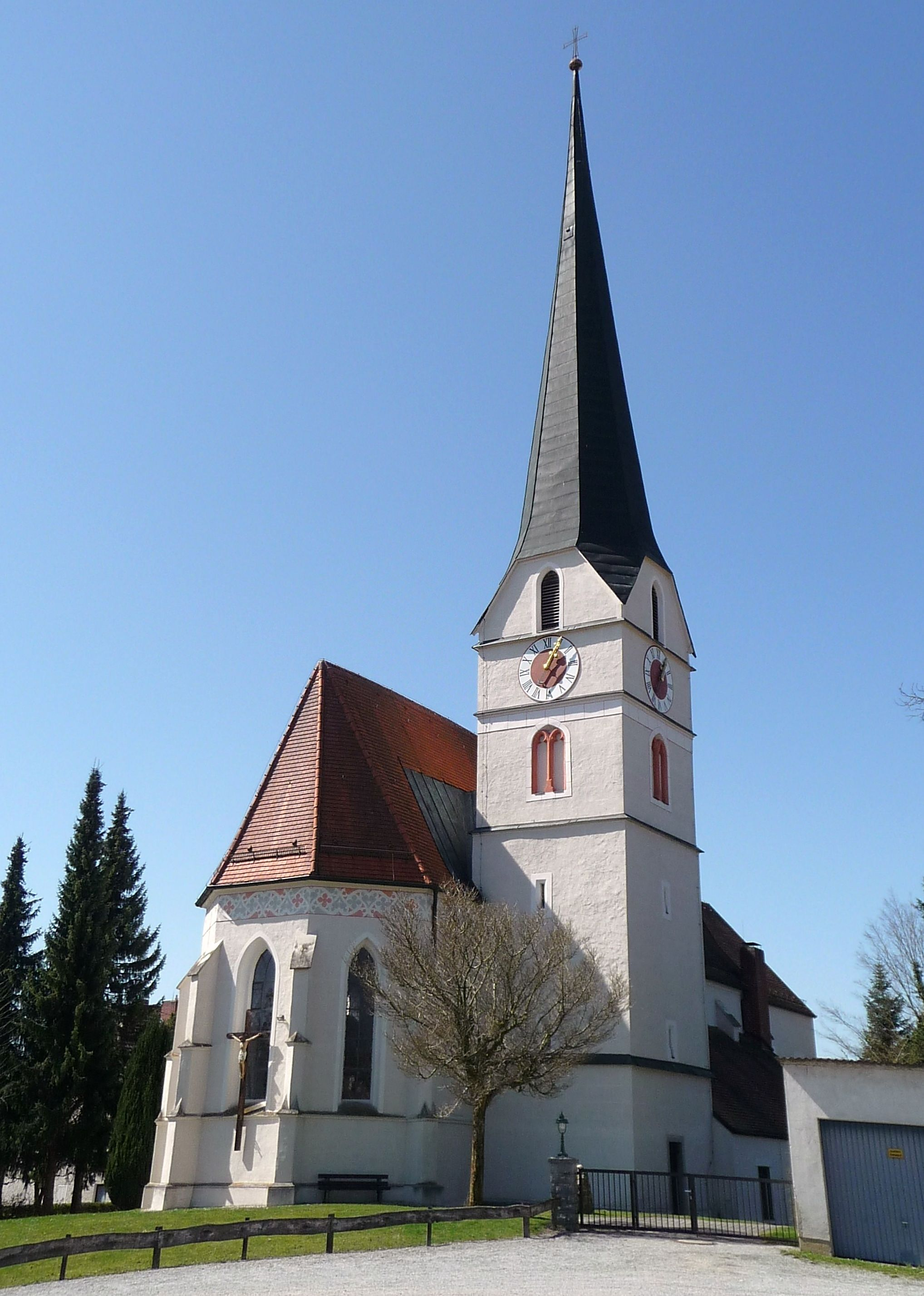 Die Pfarrkirche St. Stephanus in Sulzbach am Inn